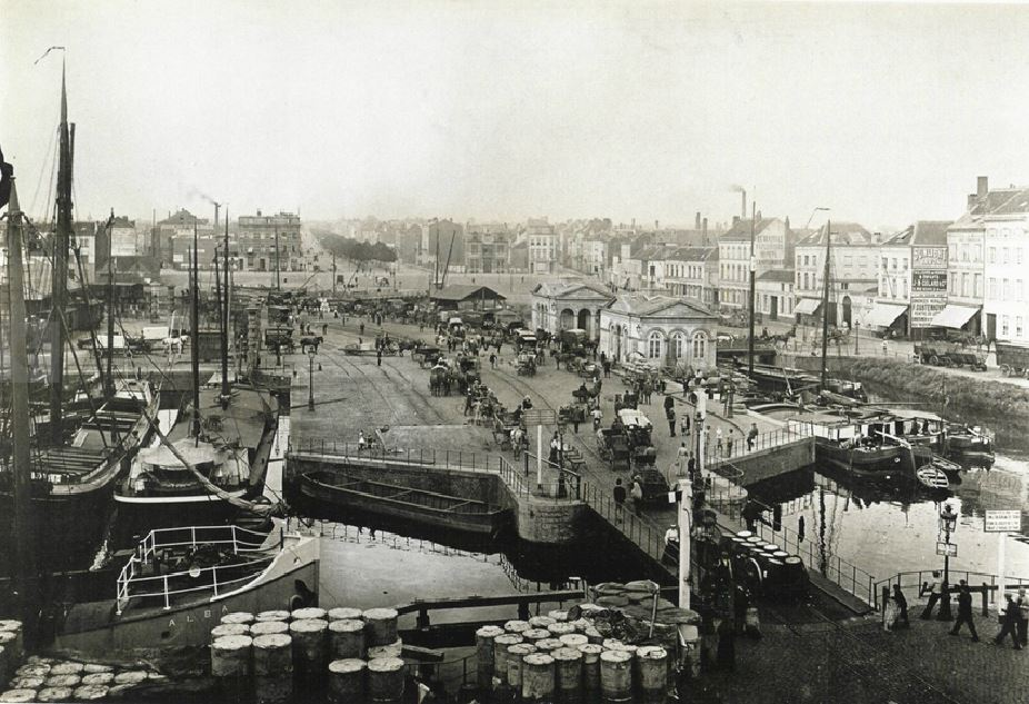 Adrien Louvois, Porte du Rivage et ses abords, 1899, AVB M-2010